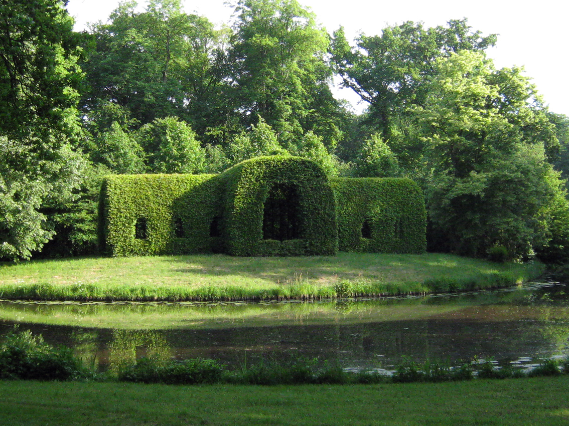 Hainbuchenlaube in Bremen.Das abgebildete Objekt ist ein geschütztes Kulturdenkmal in der Freien Hansestadt Bremen, mit der Nr. 0218,T035 beim Landesamt für Denkmalpflege registriert.